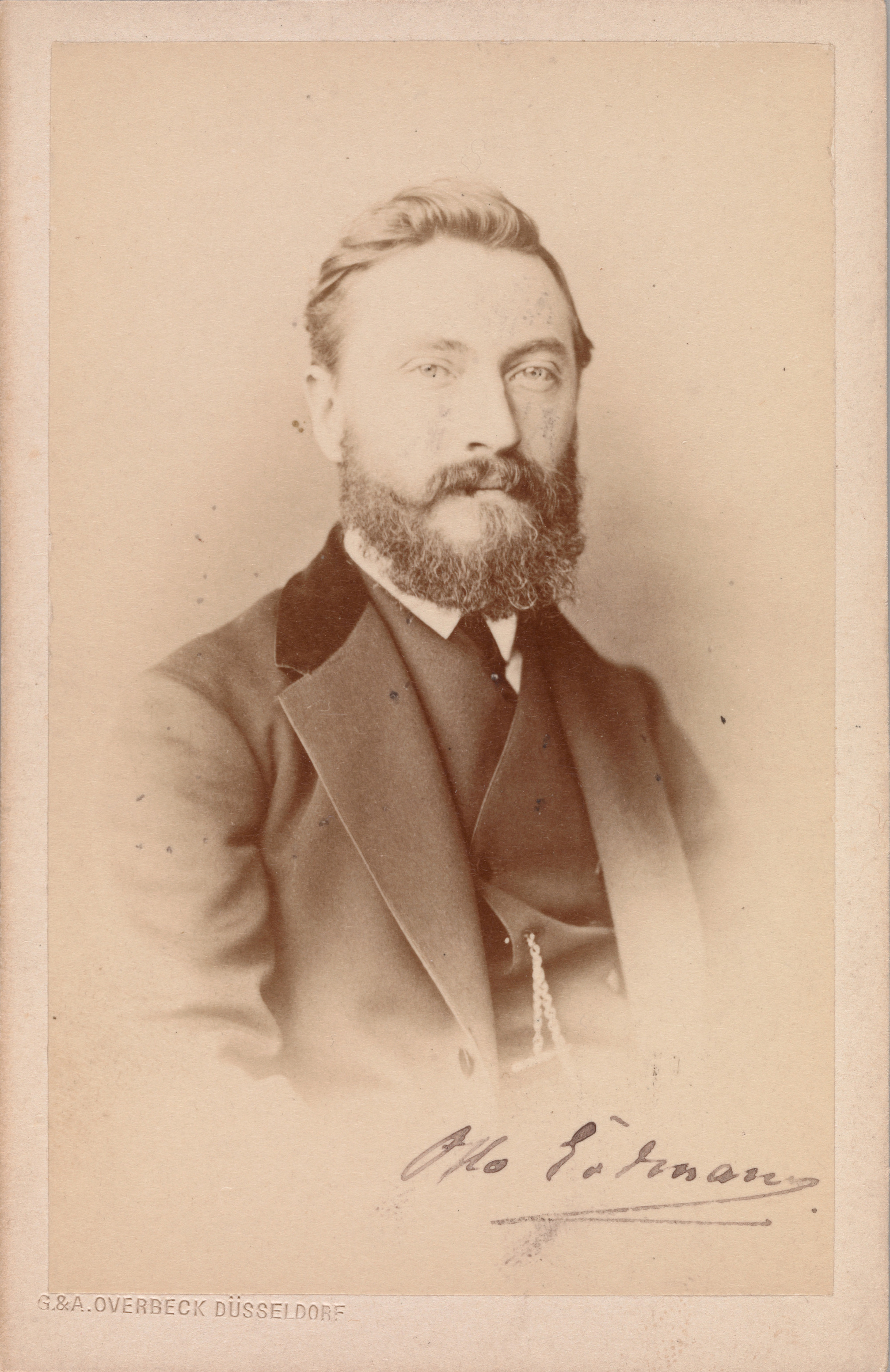 Person in photograph Otto Wilhelm Eduard Erdmann (German, 1834–1905)